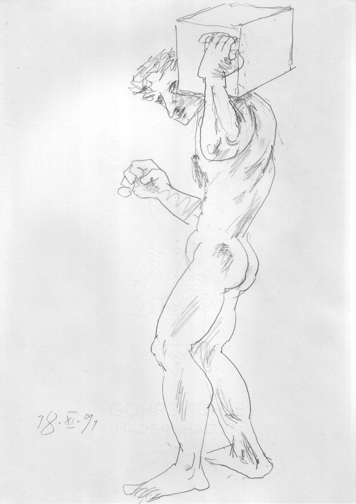 Männlicher Akt